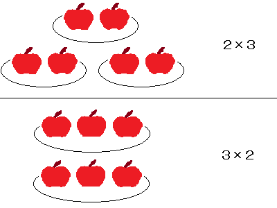 加藤明教授・かけ算の意味